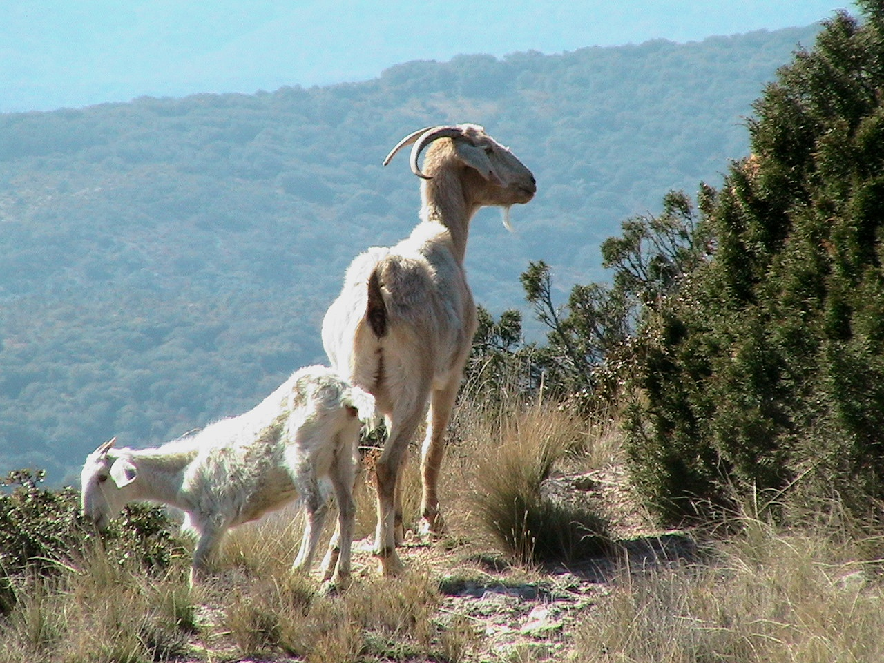 Cabres del Montsec pasturant a la carena del Pas de Nerill, al Montsec (Noguera - Catalunya)